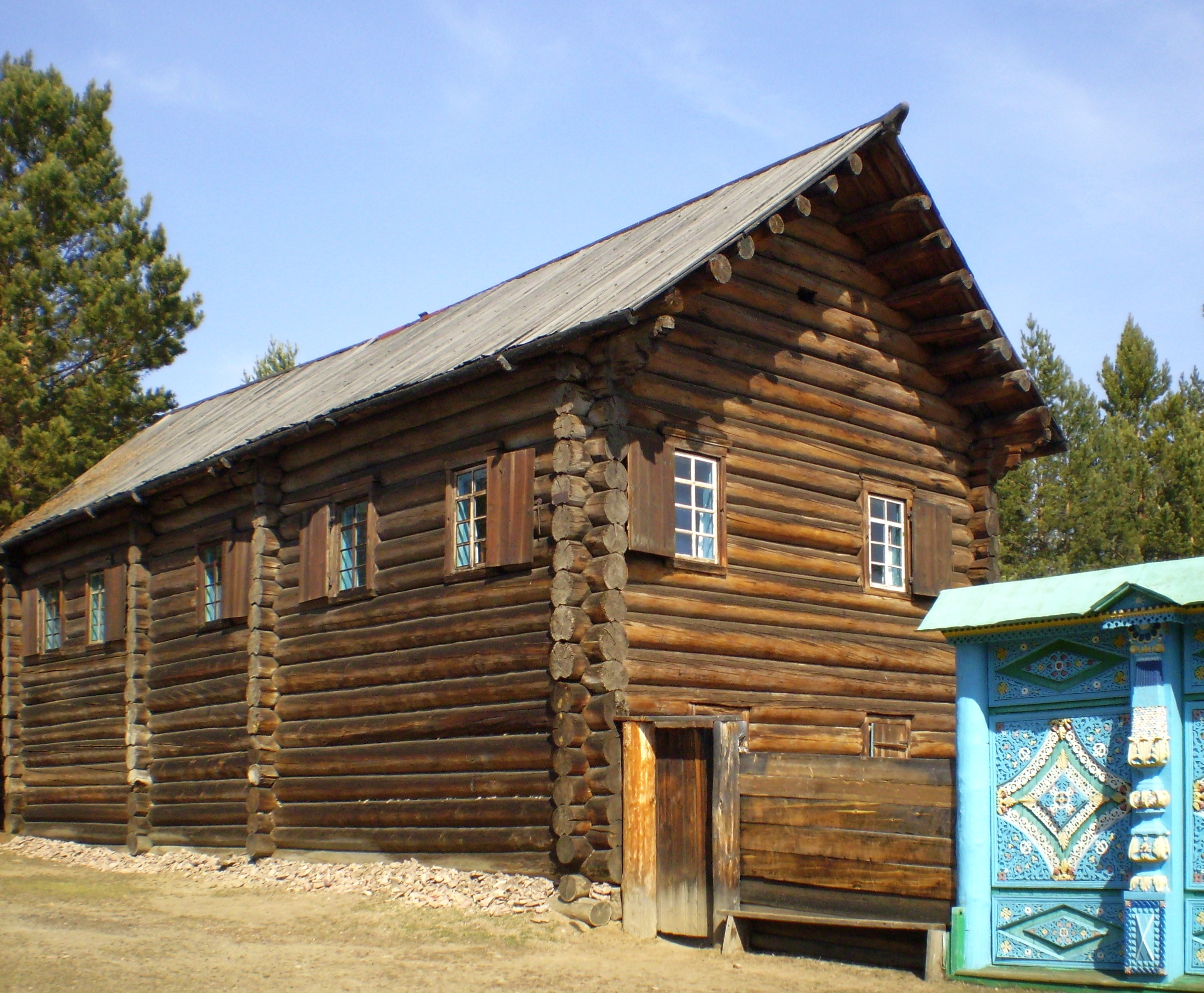 Старообрядческий дом